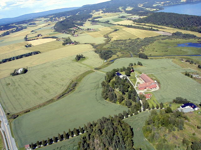 Steinssletta og Vegårdsferdingen